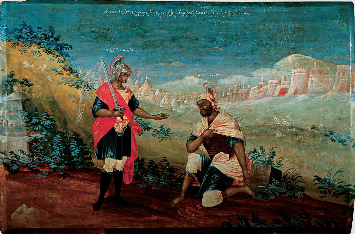 Явление Архангела Михаила Иисусу Навину Последняя четверть XVIII в. (около 1778 года?) Дерево, темпера 49 × 72.3 см Рыбинский государственный историко-архитектурный и художественный музей-заповедник, Россия Инв. РБМ 4550